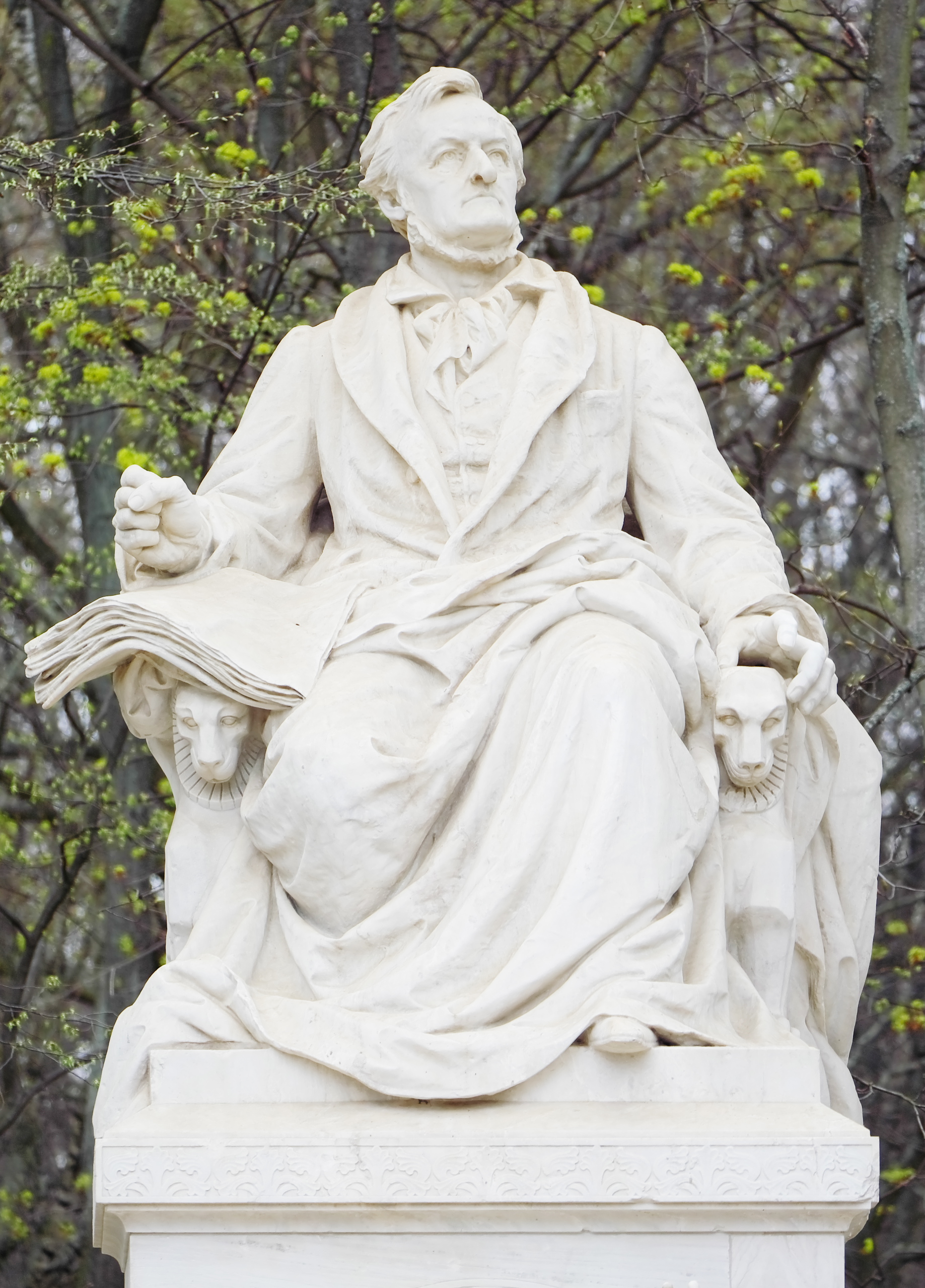 Richard Wagner auf dem Sockel des Richard-Wagner-Denkmals im Tiergarten von Berlin